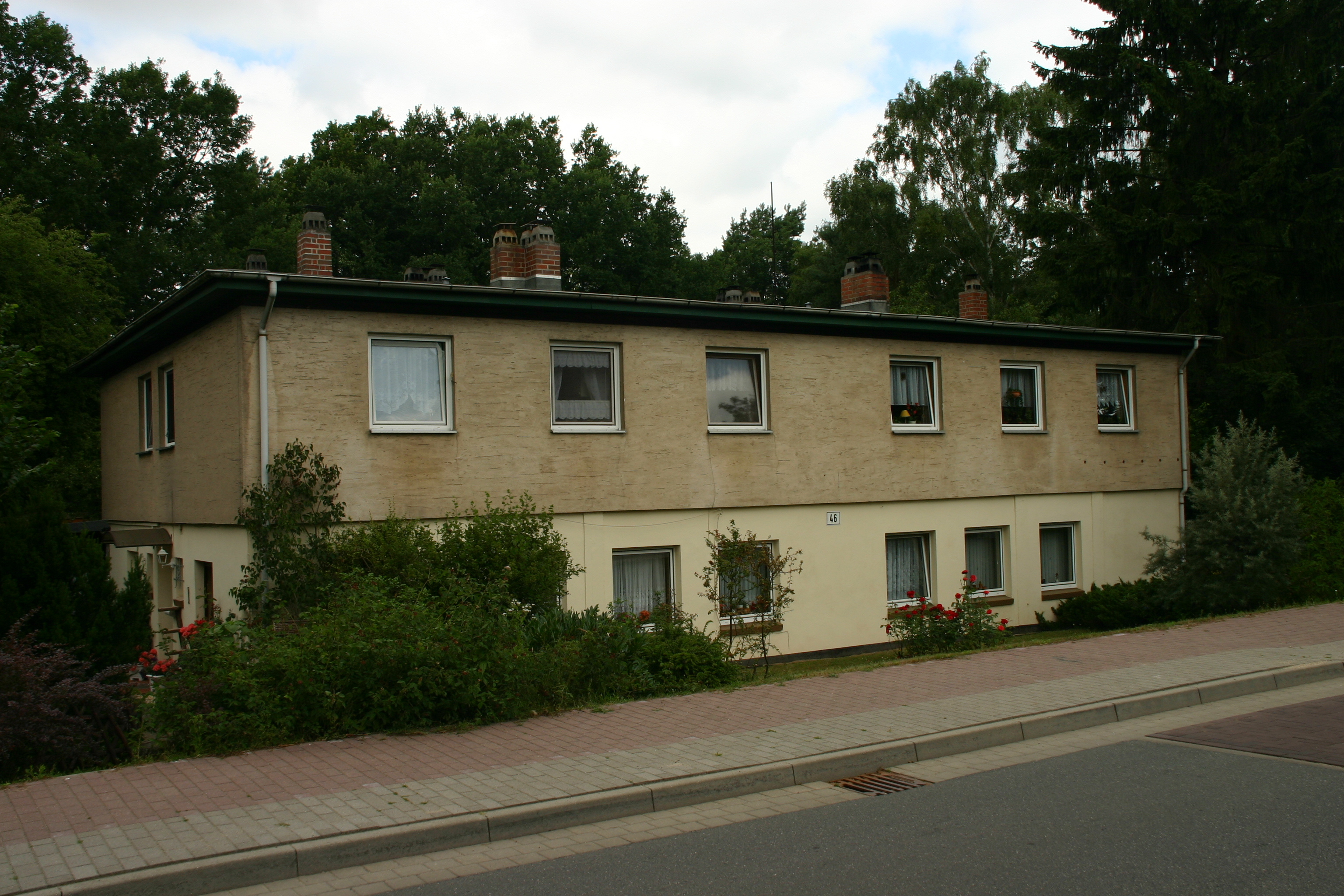 Ehemaliger Bunker, heutiges Wohnhaus